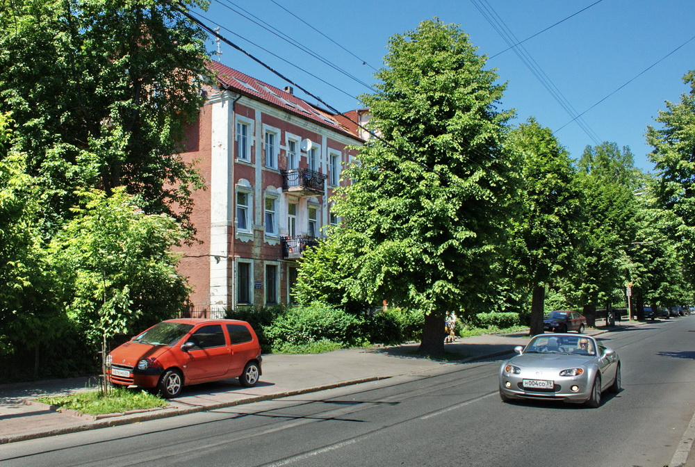 ul. Komsomolskaia (Luisenallee)